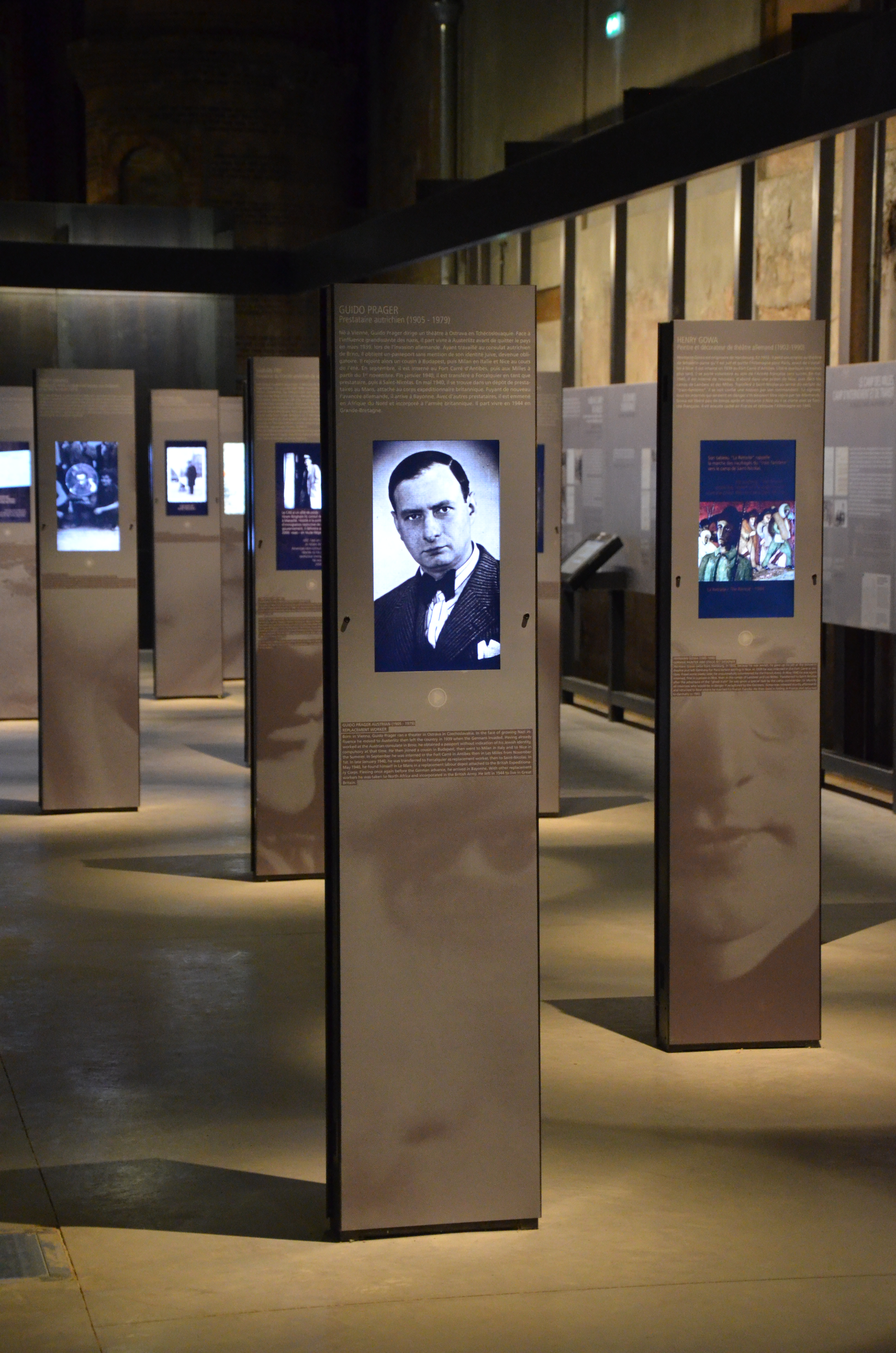 In memoriam au camp des Milles